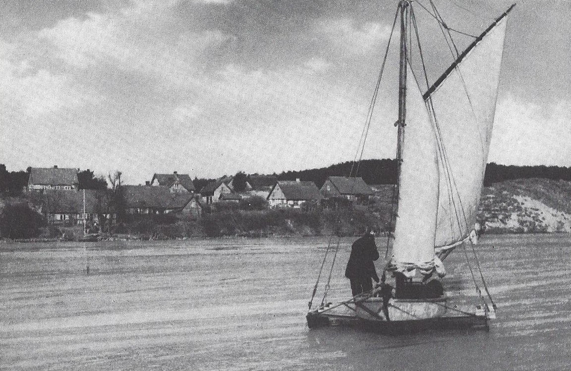 Narmeln am Frischen Haff in Ostpreußen)